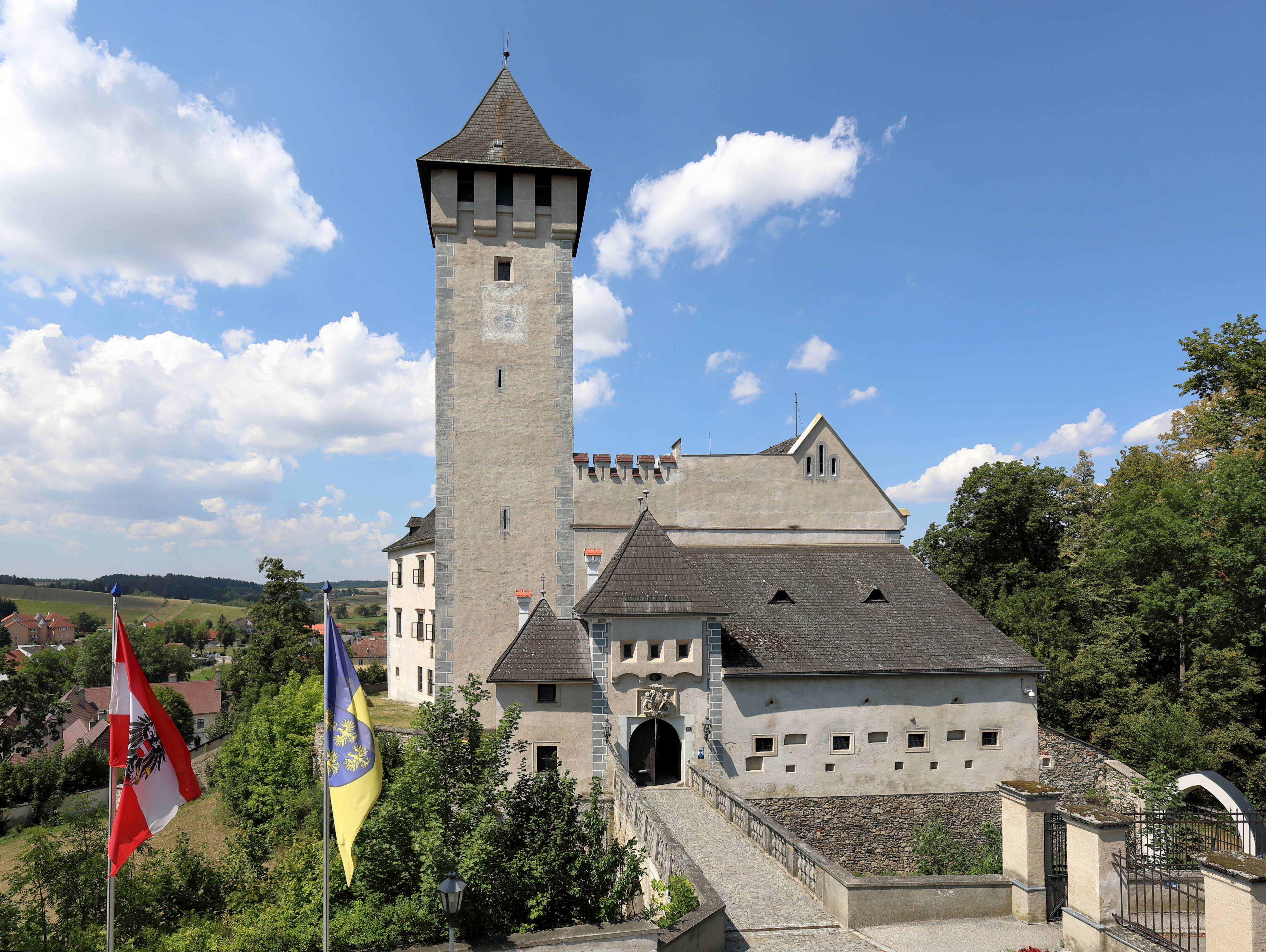 Ostansicht des Schlosses Allentsteig in der niederösterreichischen Stadtgemeinde Allentsteig.Die Wehranlage wurde um 1100 von den Kuenringer gegründet und sukzessiv ausgebaut. Von 1544 bis 1570 erfolgte eine Erweiterung und Umbau zu einem Renaissanceschloss. Derzeit (2018) ist im Schloss das Kommando des Truppenübungsplatzes Allentsteig untergebracht.